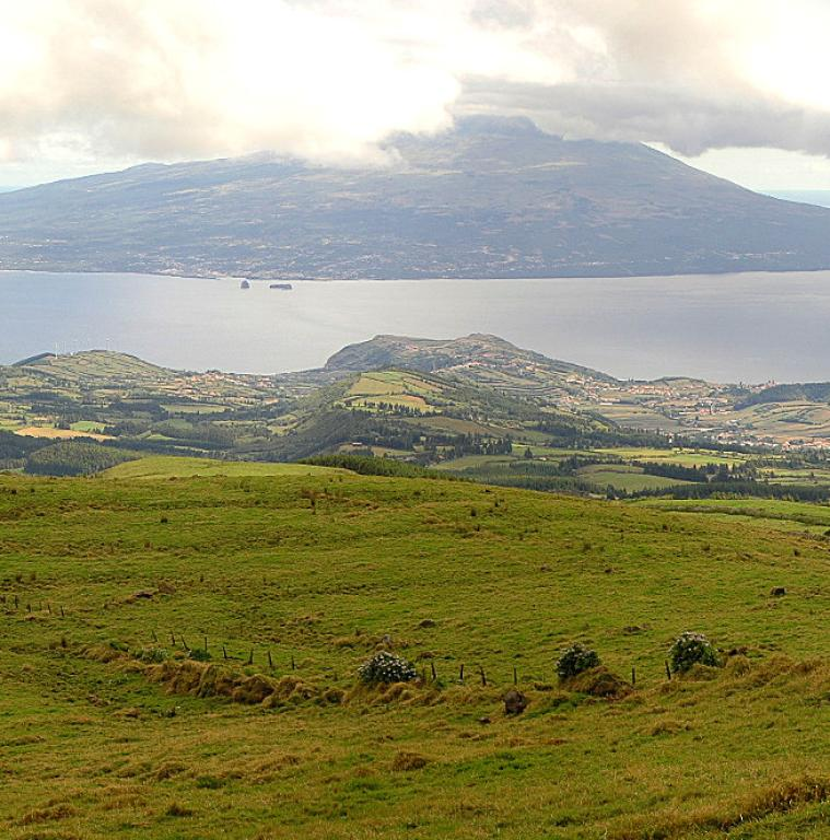 Desde el crater de Faial